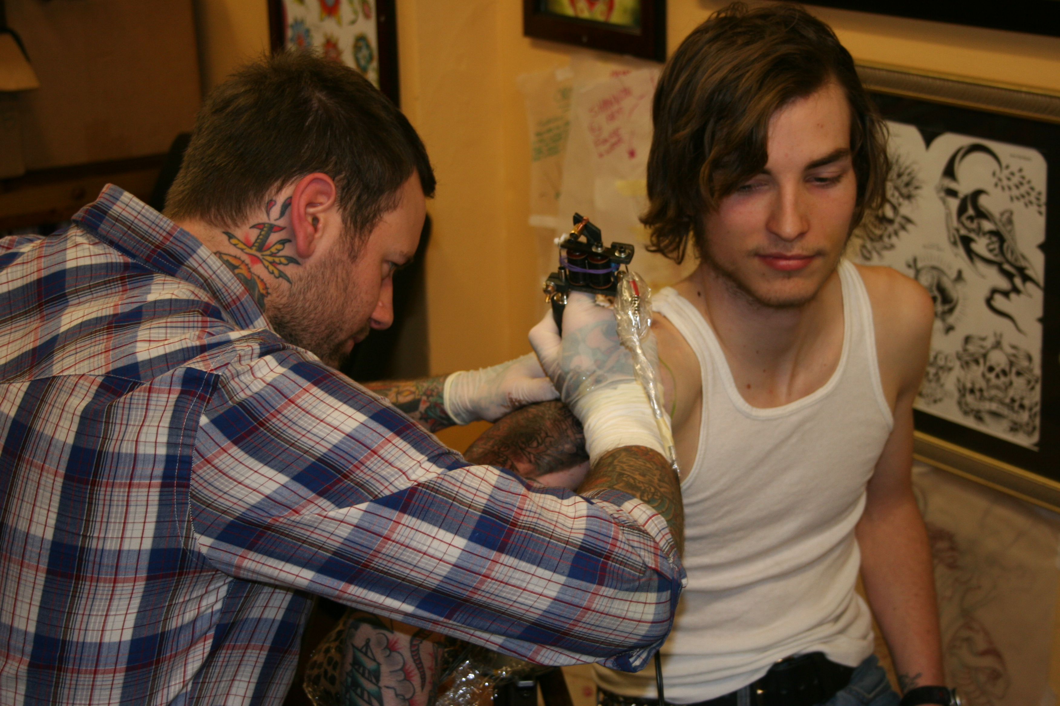 Tattoo being set.